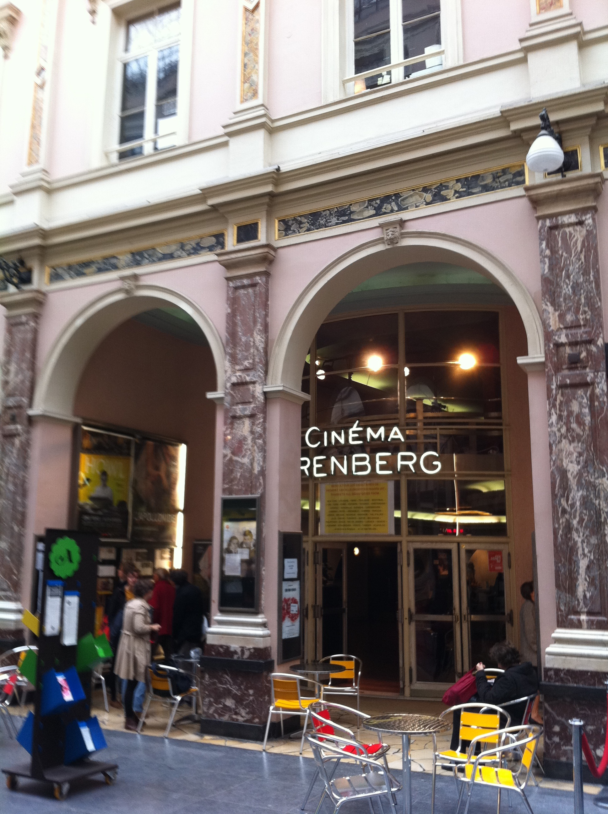 Cinéma des Galeries- KONINGINNEGALERIJ 28